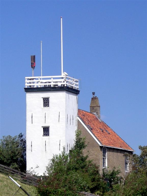 Vuurtoren in Workum